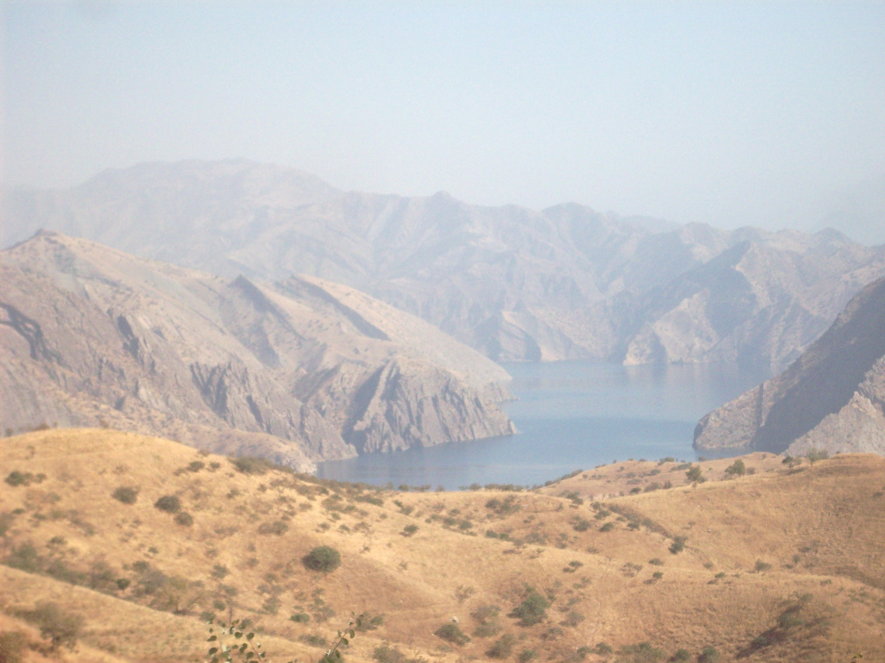 norak reservoir 6, Tajikistan.